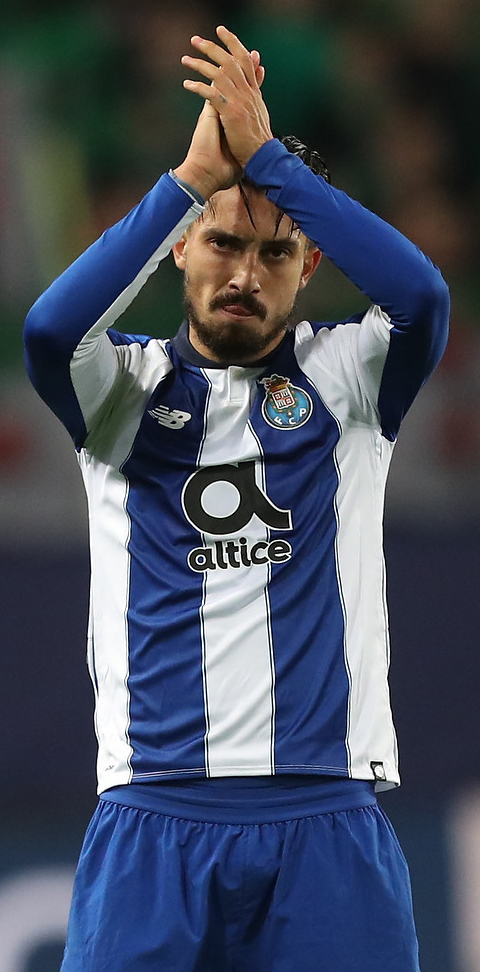 «Локомотив» терпит очередное поражение в Лиге чемпионов